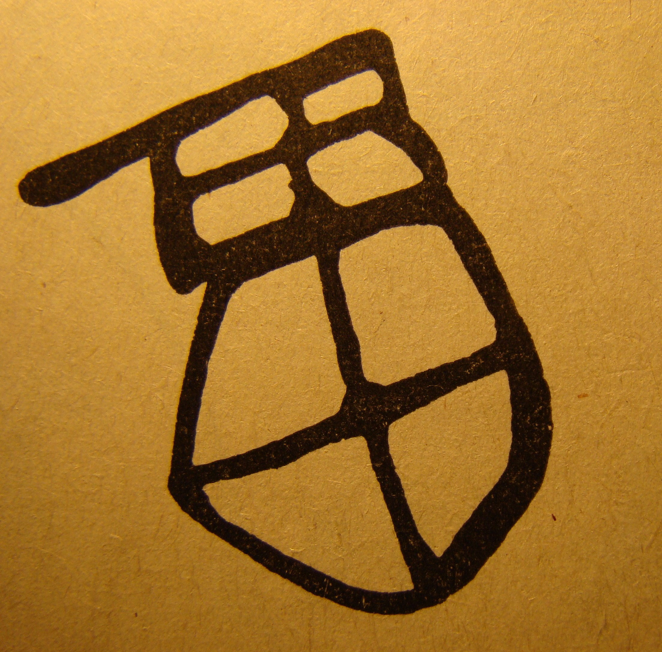 Солярный знак, писаница Бага-Заря